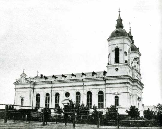 Стара світлина Собору Успіння Пресвятої Богородиці в Зальці